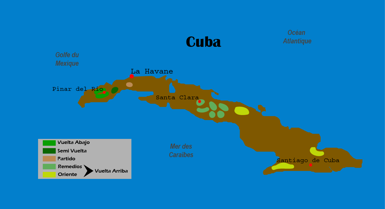 Les lieux de culture du tabac à cuba.